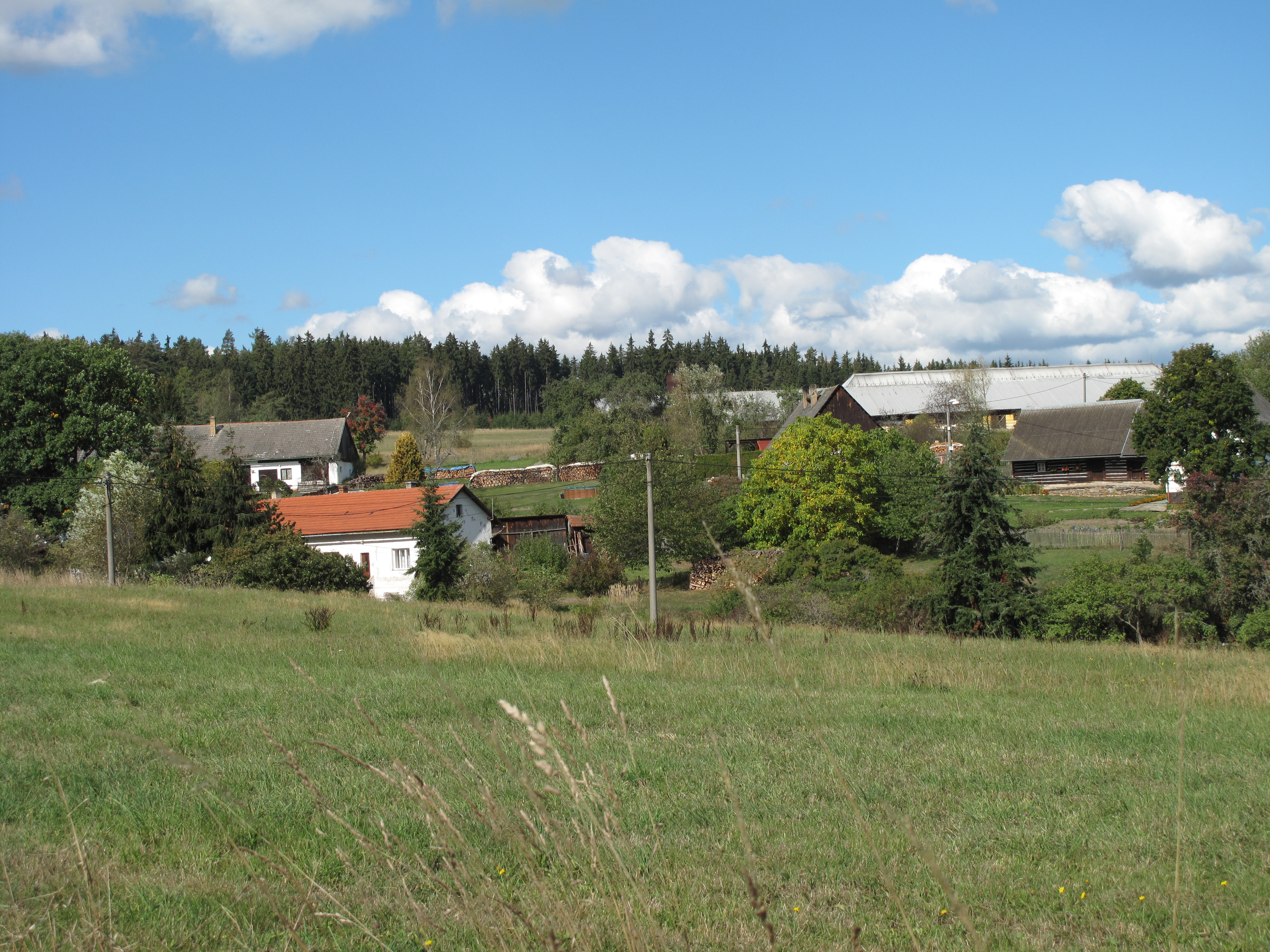 Pohled na Lipí. Okres Plzeň-sever, Česká republika.